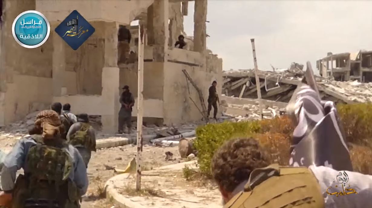 Djihadistes du Front al-Nosra pendant la bataille de Jisr al-Choghour (avril-mai 2015)